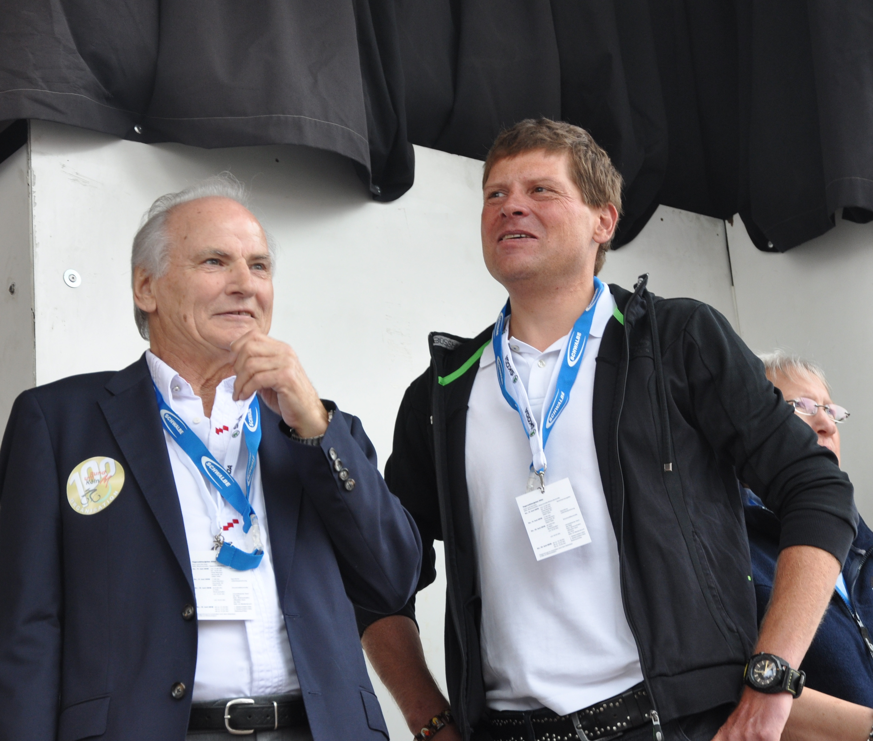 Artur Tabat, Organisator von Rund um Köln, (l.) und Jan Ullrich, deutscher Radrennfahrer